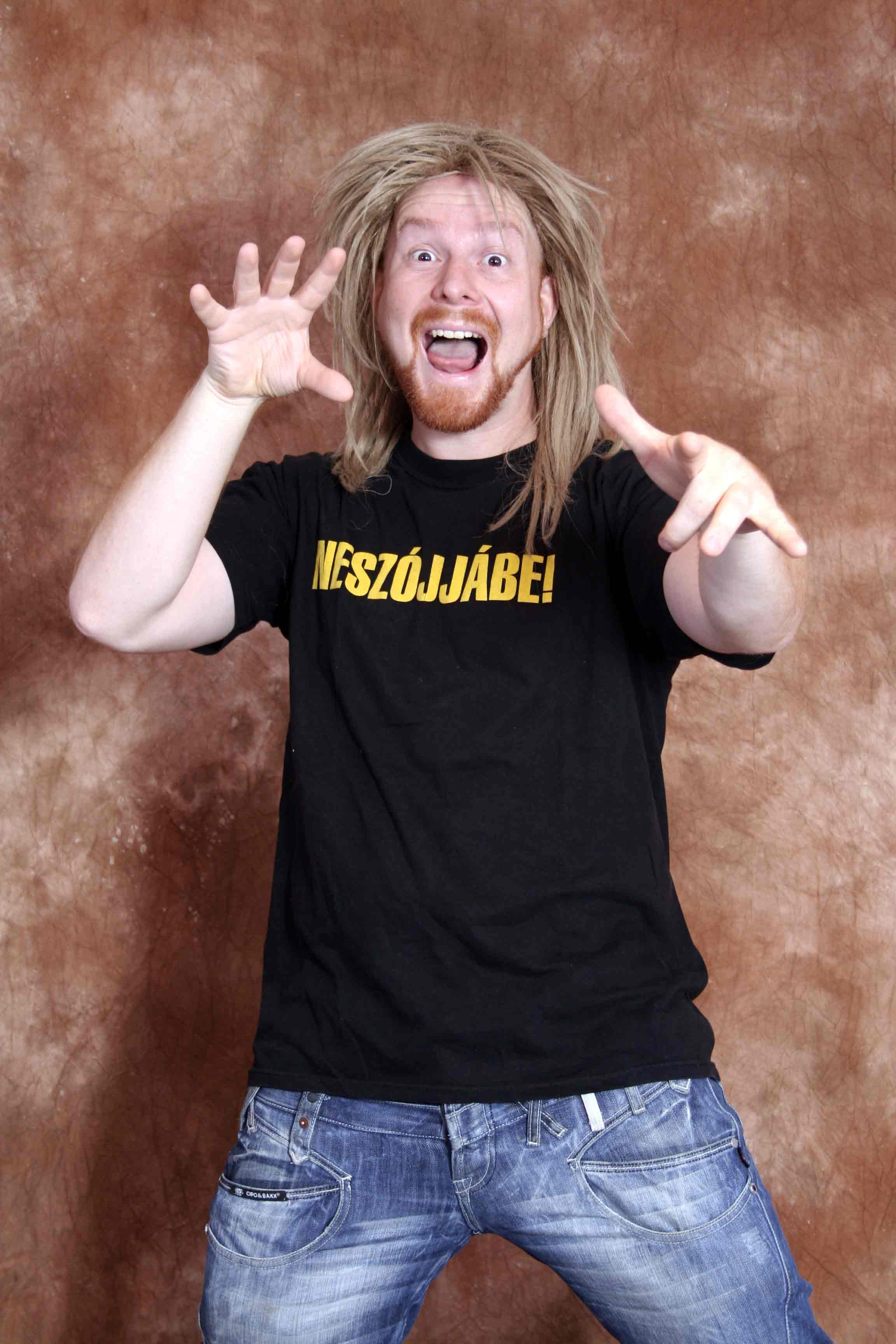 Erdei Sándor mint Rokker Zsoltti (a művész engedélyével és winchesteréről, )